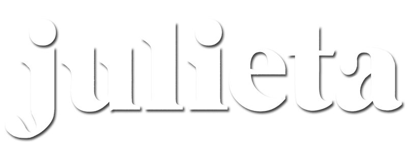 Logo de la película de 2016 "Julieta".